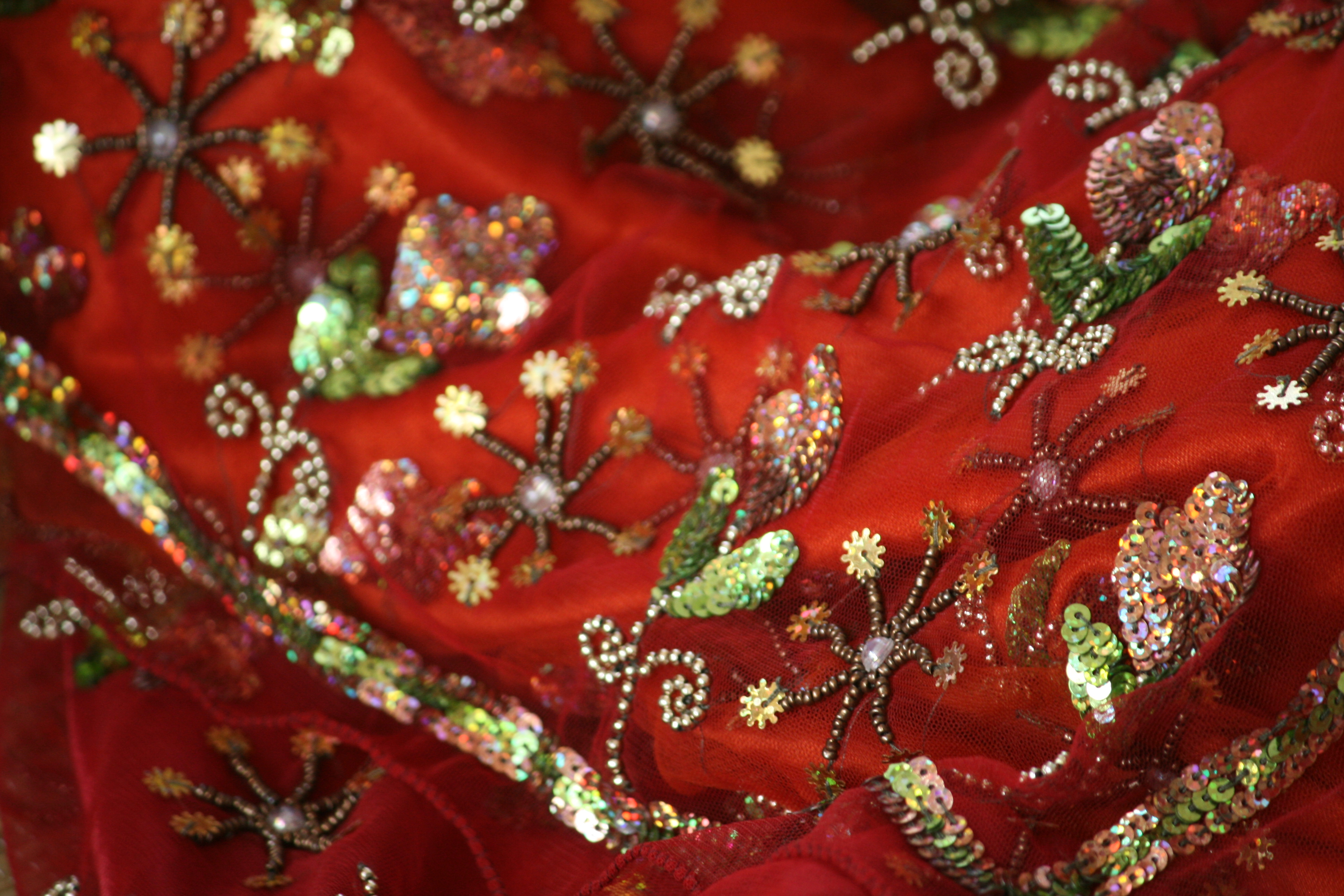 Saree Designs